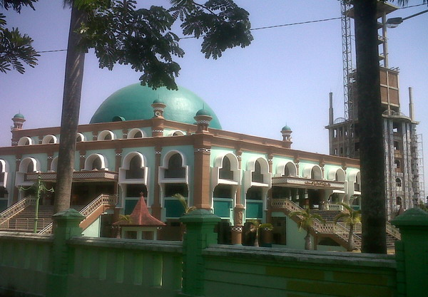 Masjid Agung Sumber, Komplek Pemkab Cirebon, Kecamatan Sumber, Kabupaten Cirebon, Provinsi Jawa Barat, Indonesia.